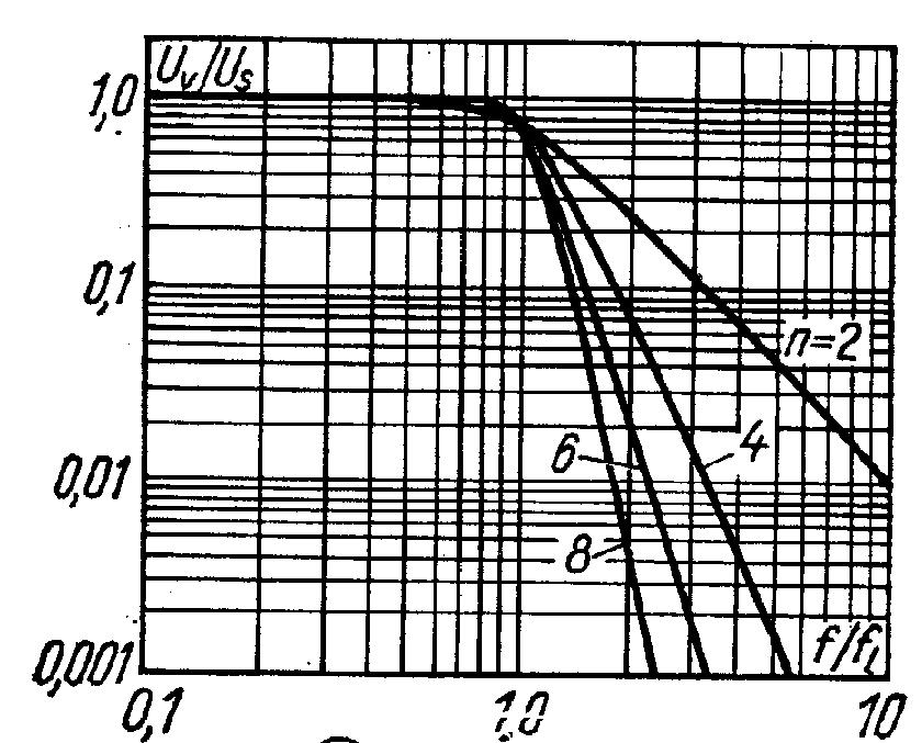 Butterworthi filtri sagedustunnusjooned